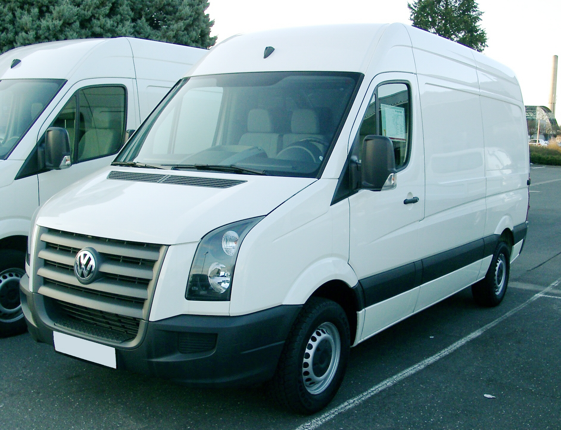 VW Crafter